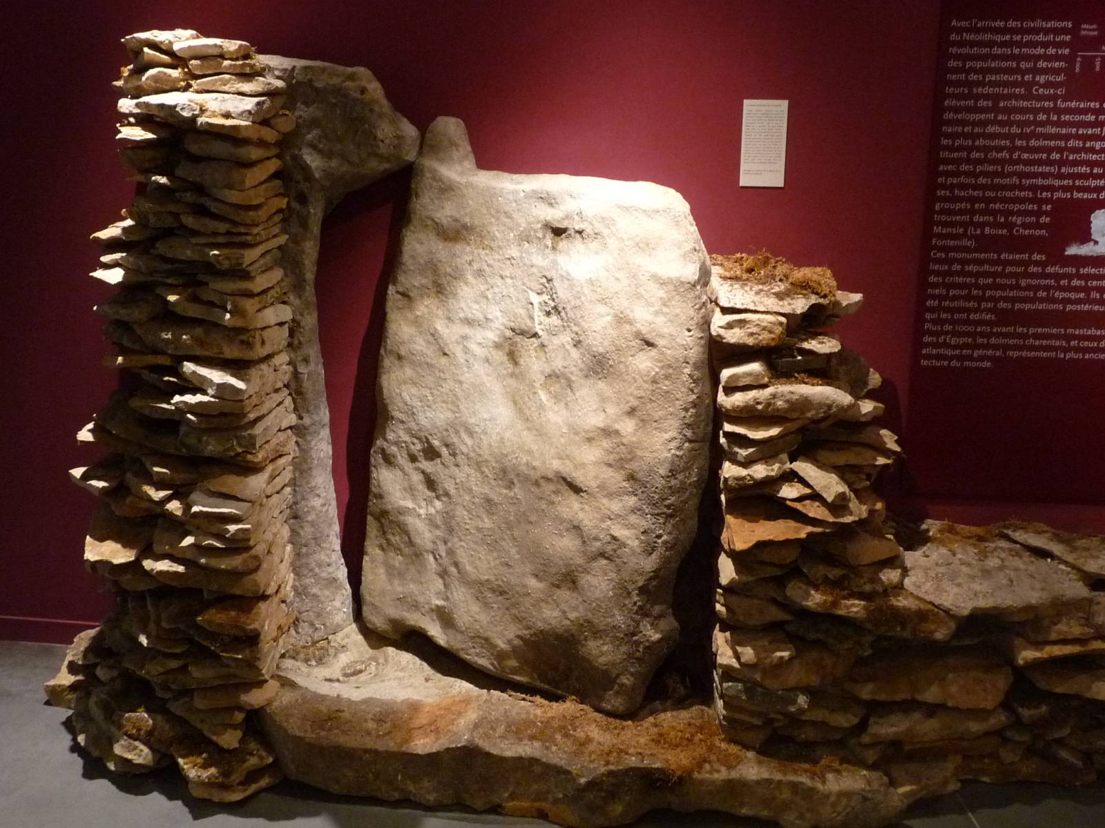 porte du dolmen de Jacquille, Fontenille. Musée des Beaux-Arts d'Angoulême, France